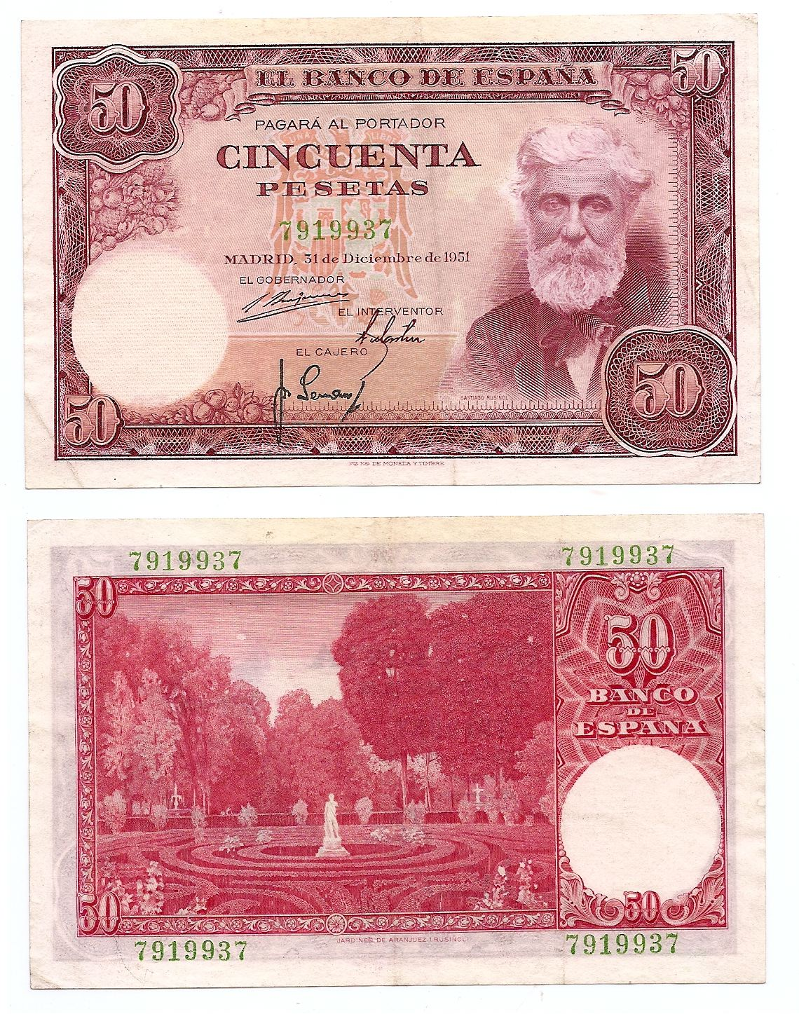 Rusiñol, Santiago, 1862 Barcelona - 1931 Aranjuez, Spain Portrait of Santiago Rusiñol at r../ Jardines de Aranuez. Pick 141a. Condition: An UNCIRCULATED bank note